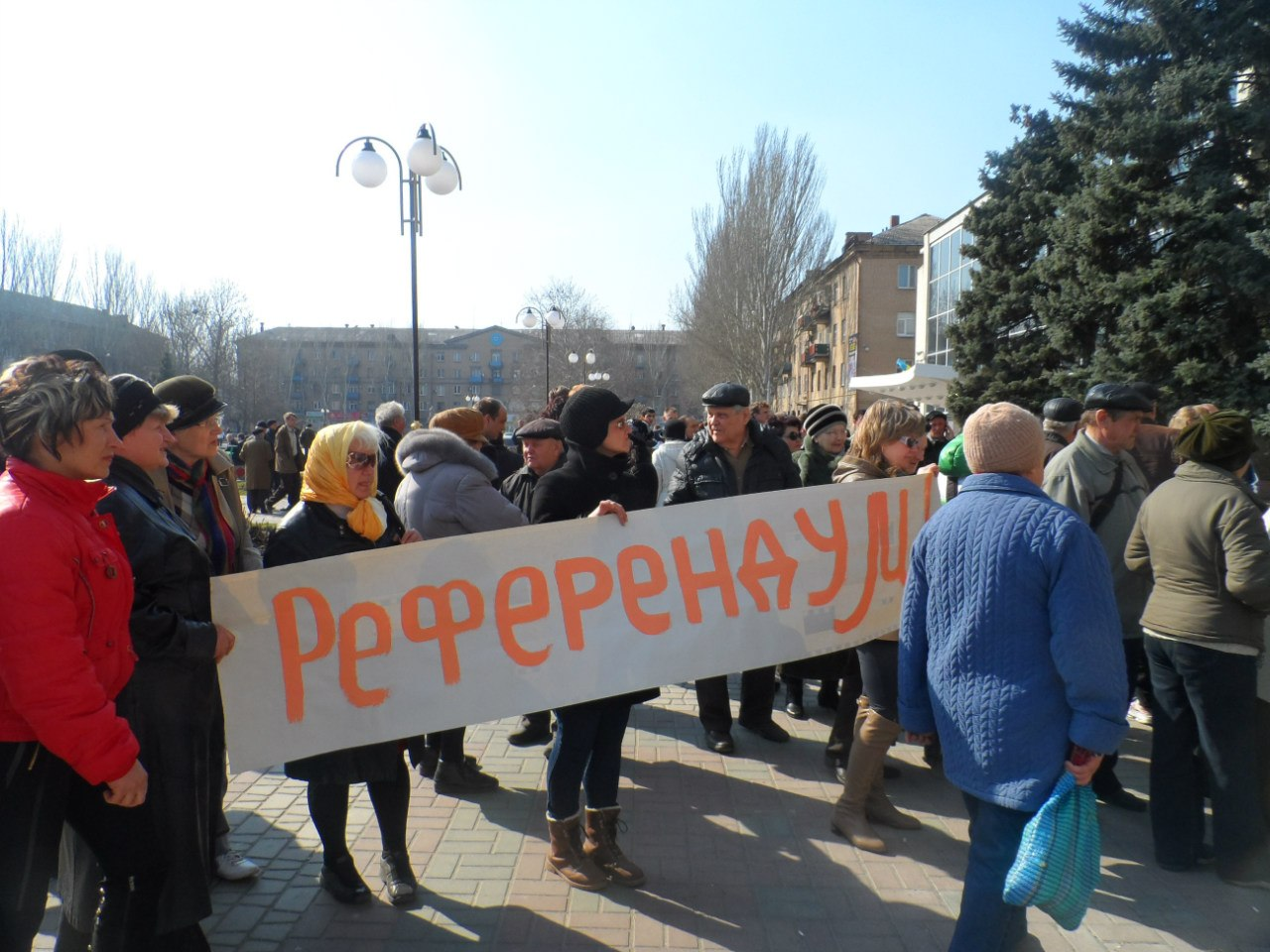 Митинг